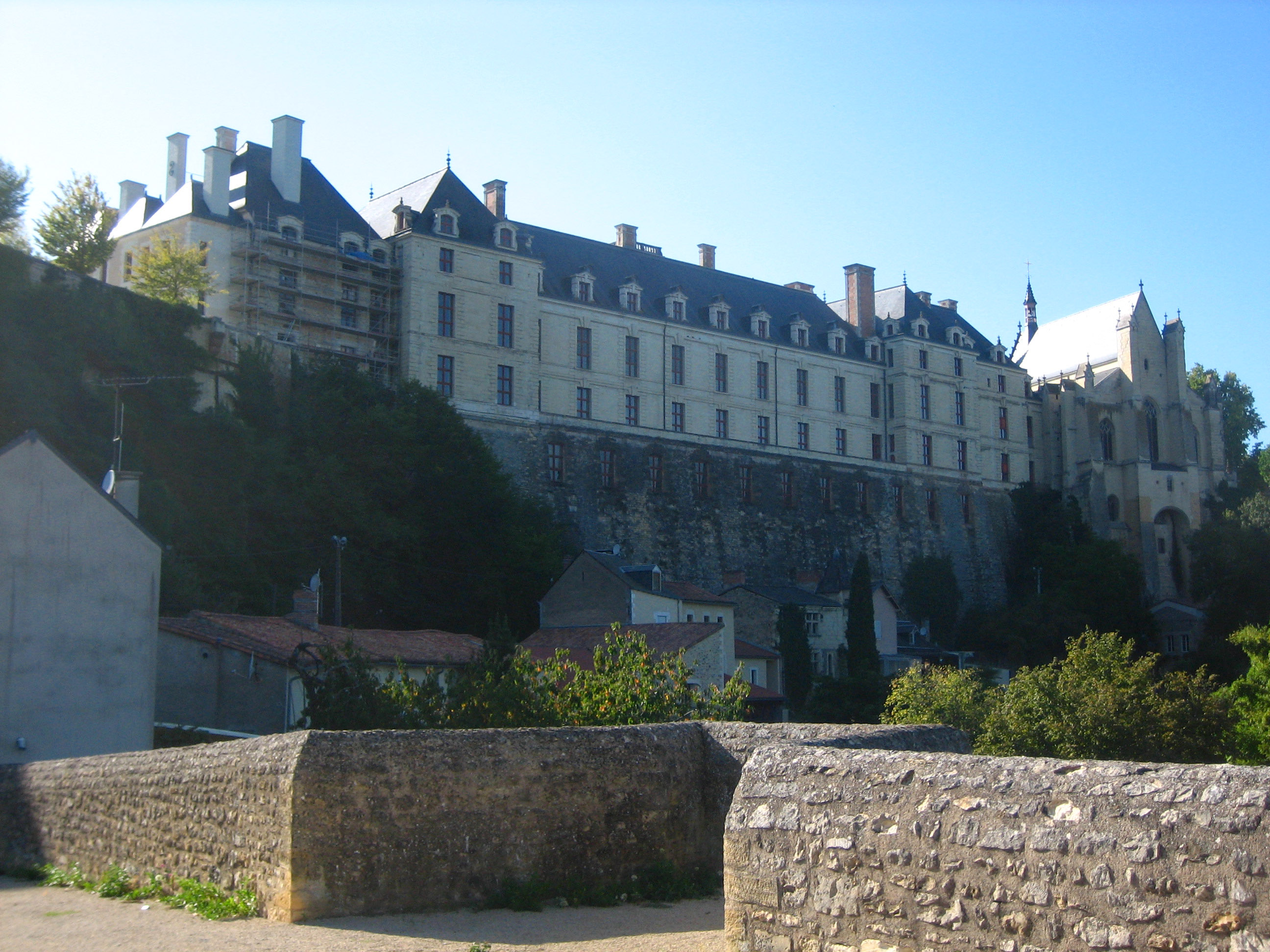 Château des Ducs de la Trémoïlle à Thouars .